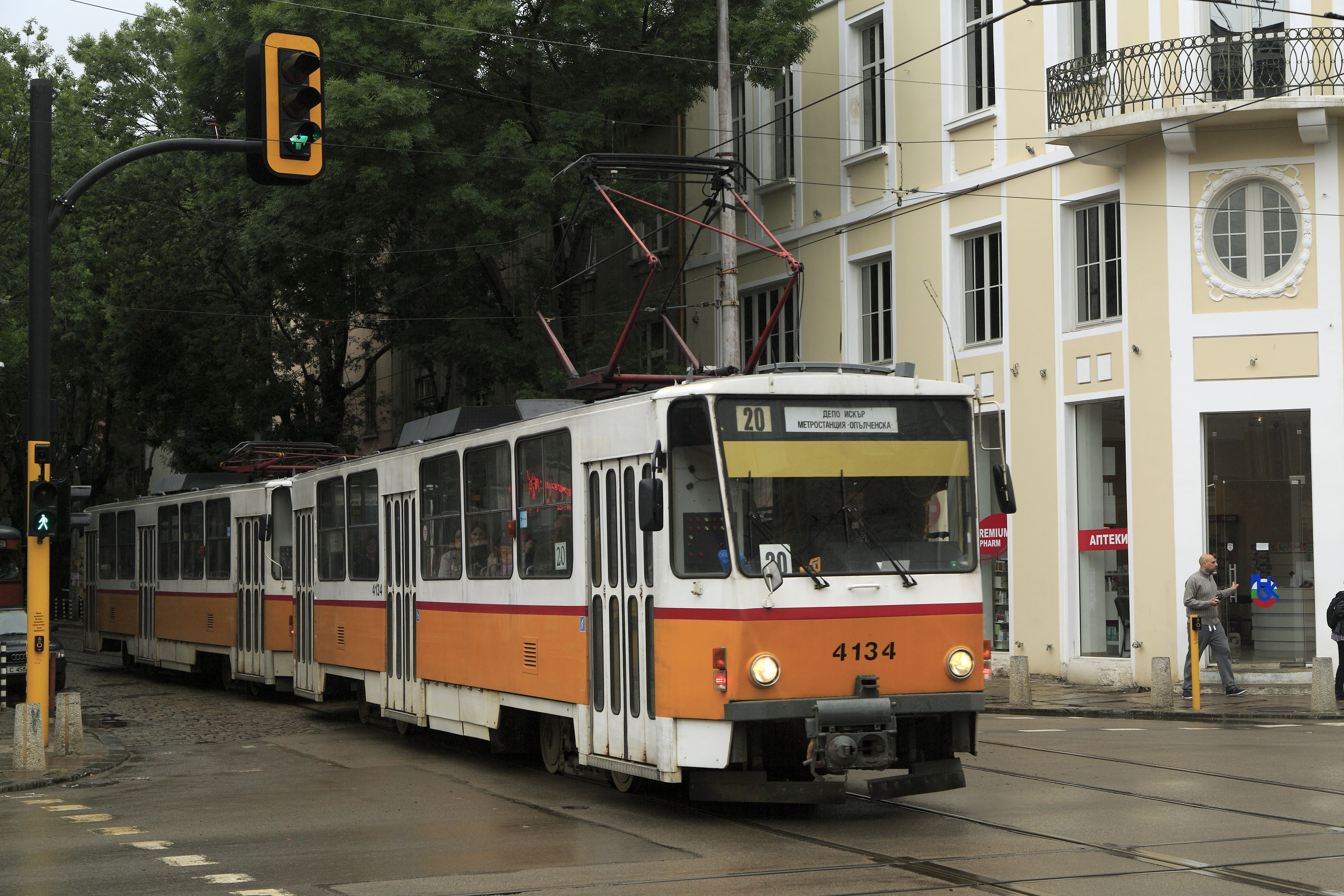 Zug zum Straßenbahn-Bw Iskăr, nach dem Wenden am U-Bahnhof Opălčenska.